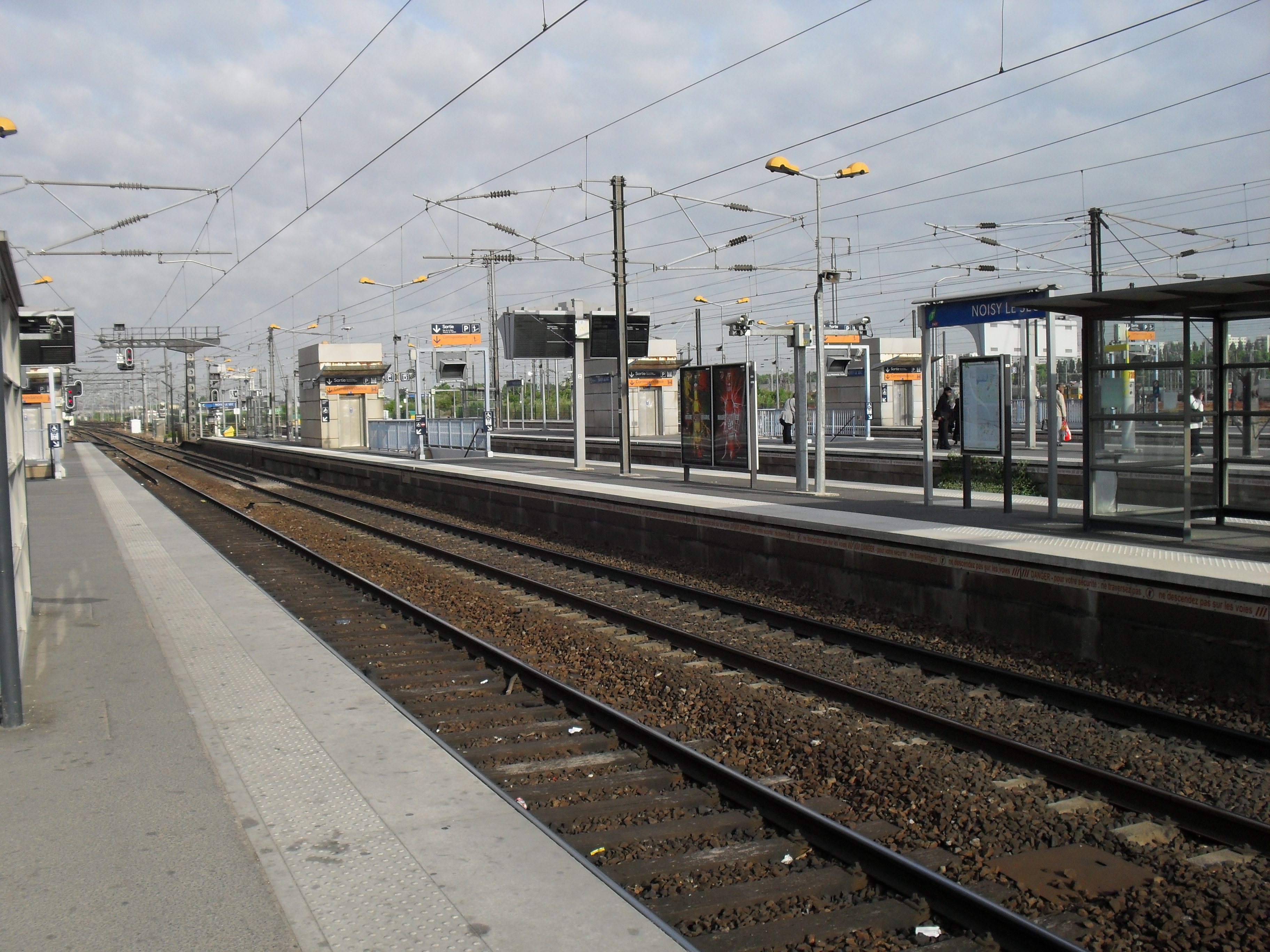 RER E - Gare de Noisy-le-Sec